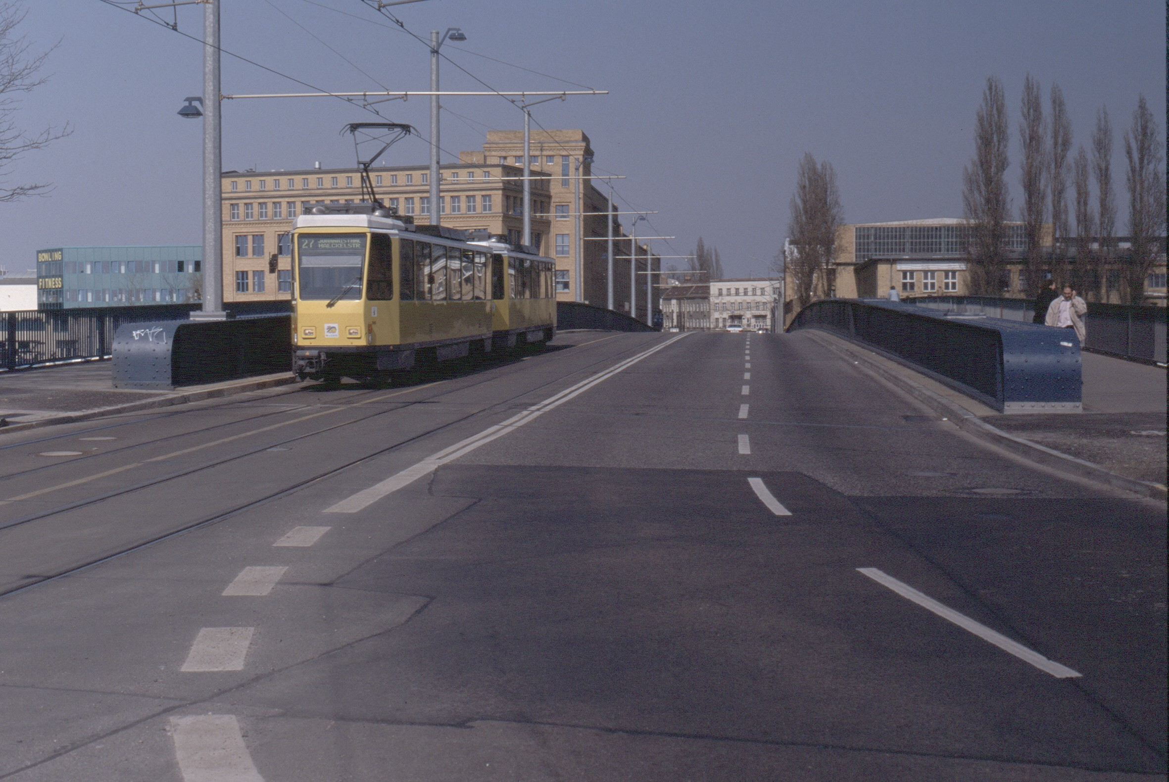 Treskowbrücke Berlin-Schöneweide